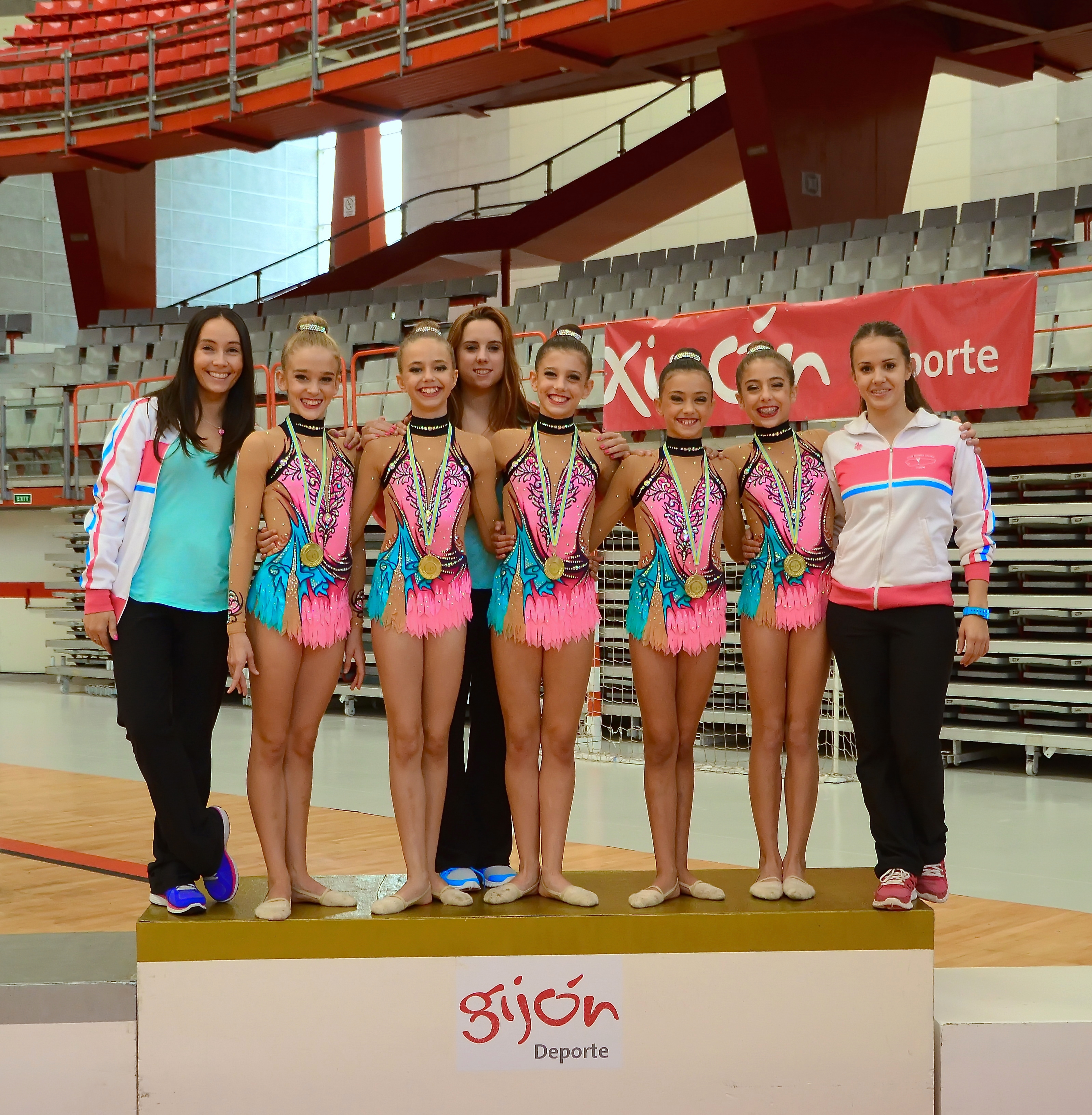 El conjunto infantil federado del Club Rítmica Galaica con el oro en el podio del Campeonato de Asturias de 2014, celebrado en el Palacio de Deportes de Gijón el 11 de octubre de 2014. Las entrenadoras, de izquierda a derecha, son Sheila Ressurreiçao, Lucía García y Raquel Rodríguez.